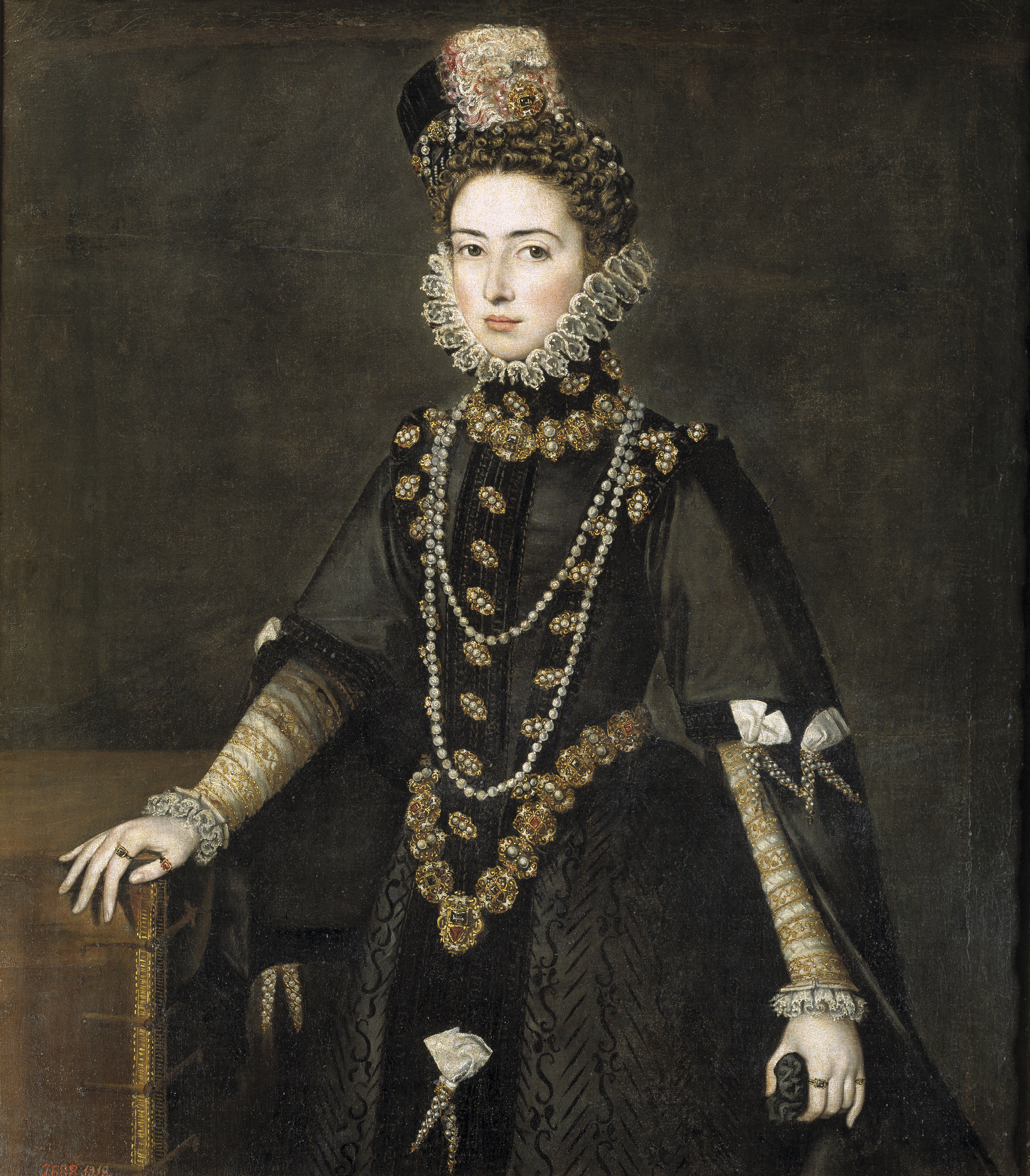 Retrato de la infanta Catalina Micaela de Austria (1567-1597), que fue hija del rey Felipe II de España y de la reina Isabel de Valois y esposa del duque Carlos Manuel I de Saboya.